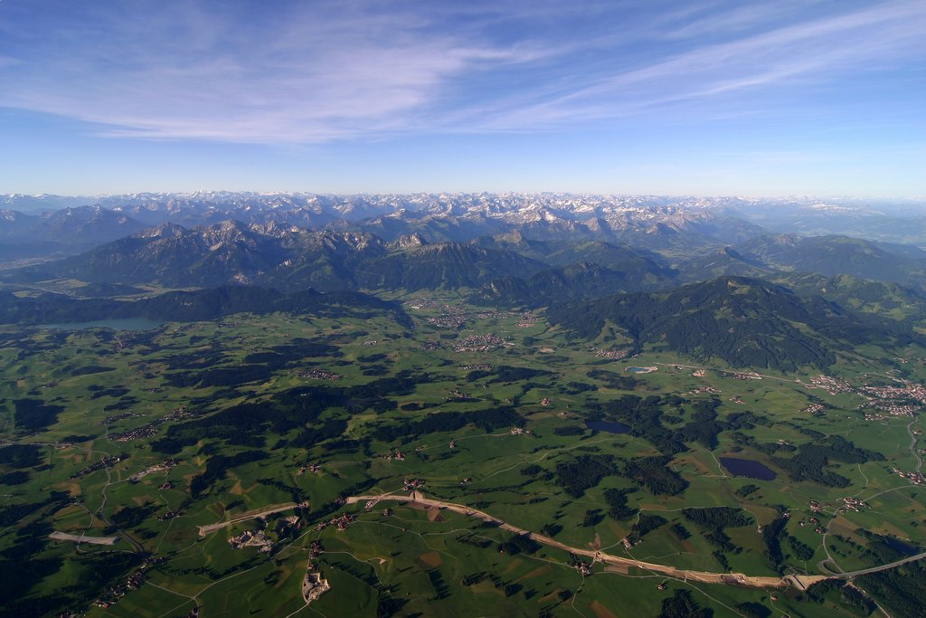 Luftaufnahme der Baustelle des letzten Teilsstücks der Bundesautobahn 7 bei Füssen.